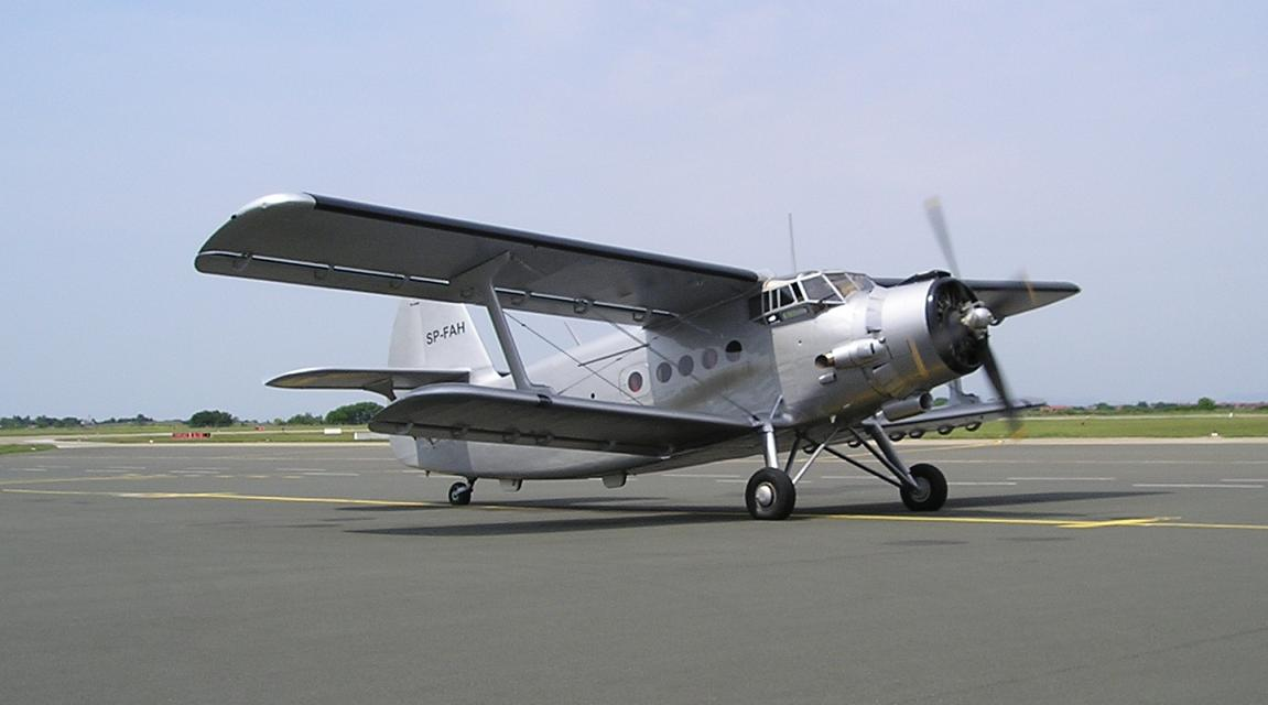 Antonov AN-2 on Airport Zagreb